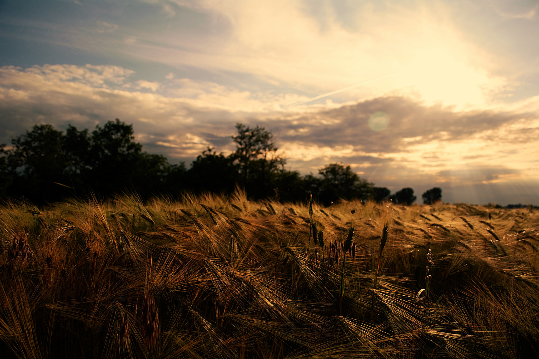 Szántóföld (a fényképen beérés alatt lévő árpa látható) Rákoscsaba-Újtelepen.